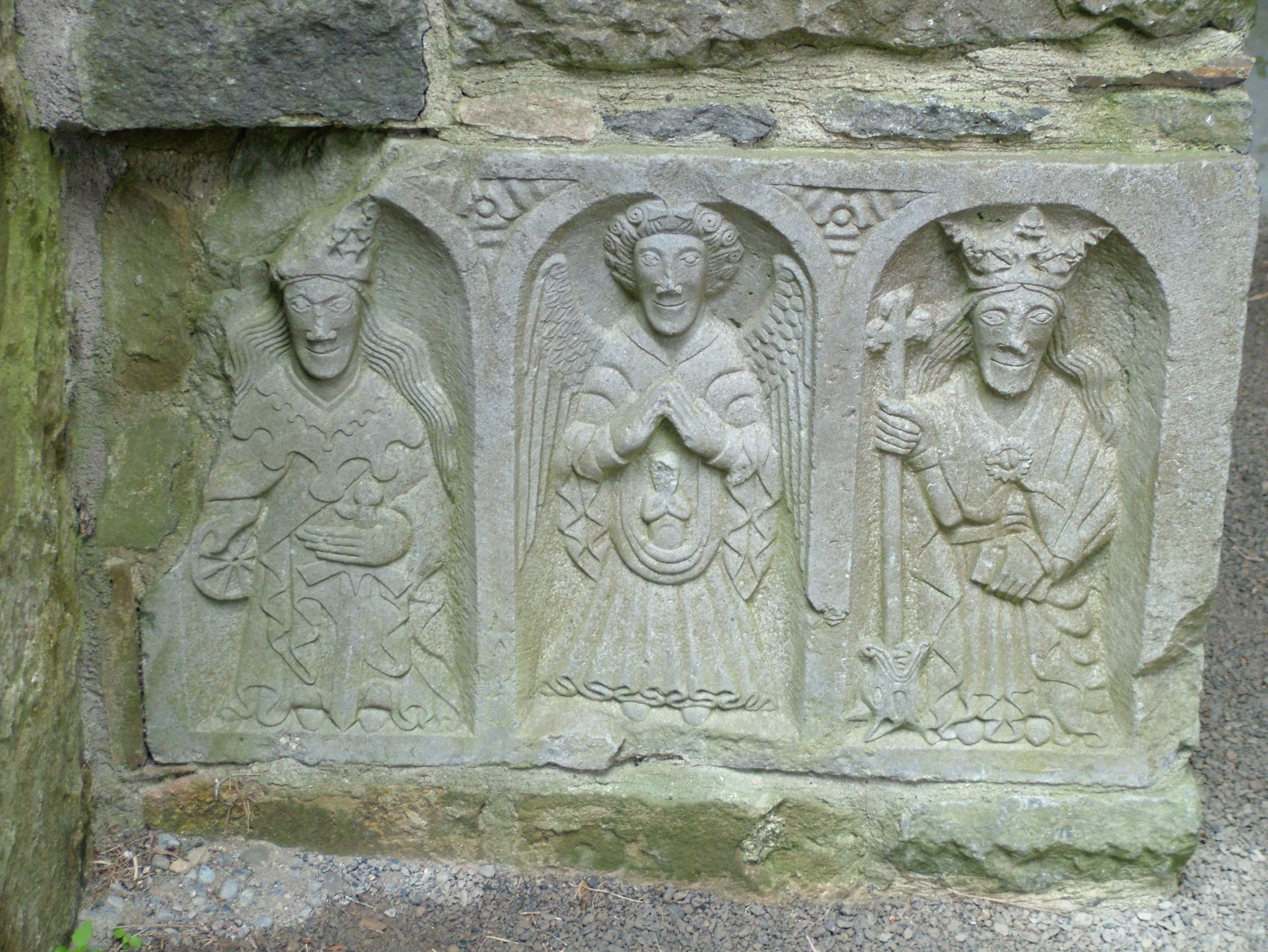 Jerpoint Abbey, Irland, die Platte der Weepers im nördlichen Querhaus